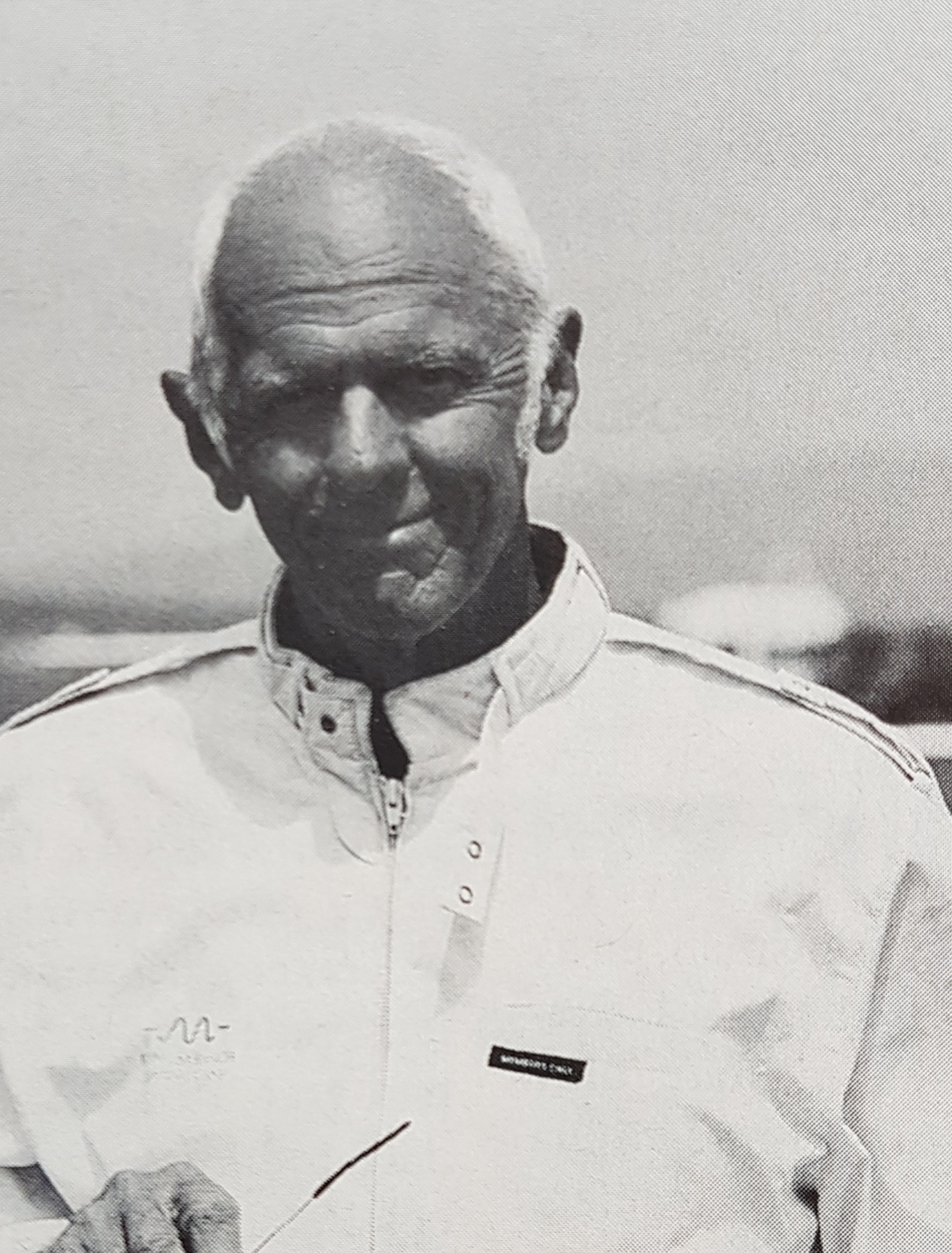 Bill Ivans chef National Air and Space Museum